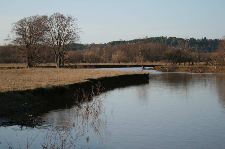 Сепыч в паводок